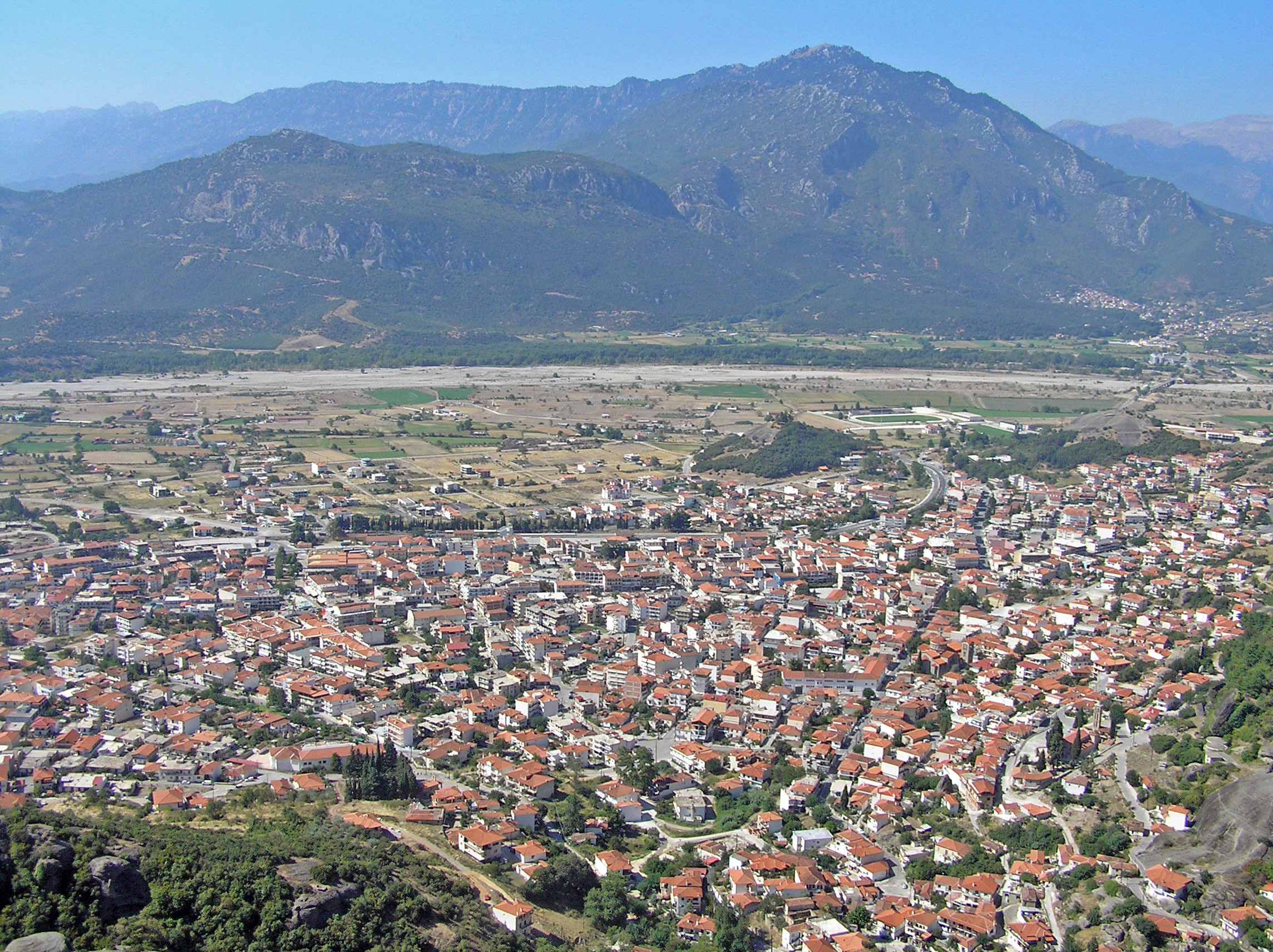 Метеора